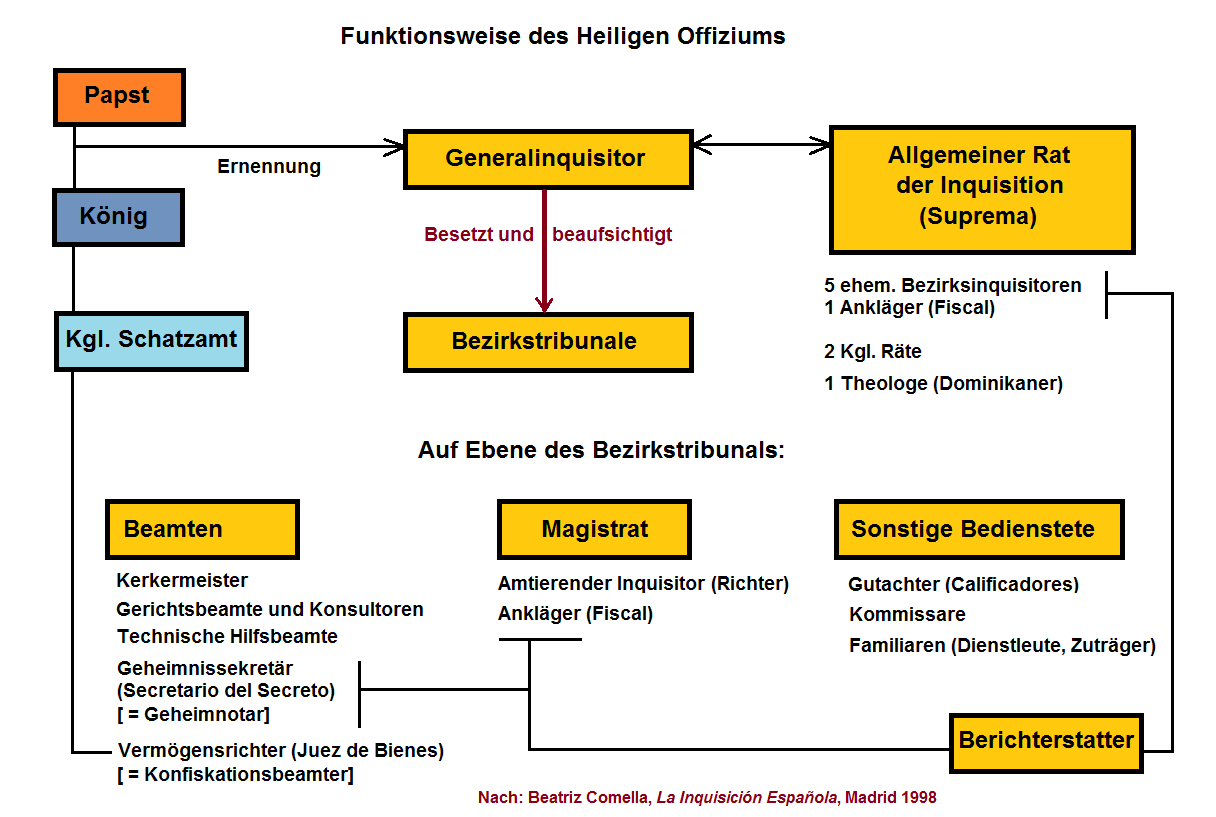 Organigramm der Spanischen Inquisition nach Beatriz Comella (OD), 1998 (übers. aus: La Inquisición Española, 4. Aufl., Madrid 2004, S. 195)